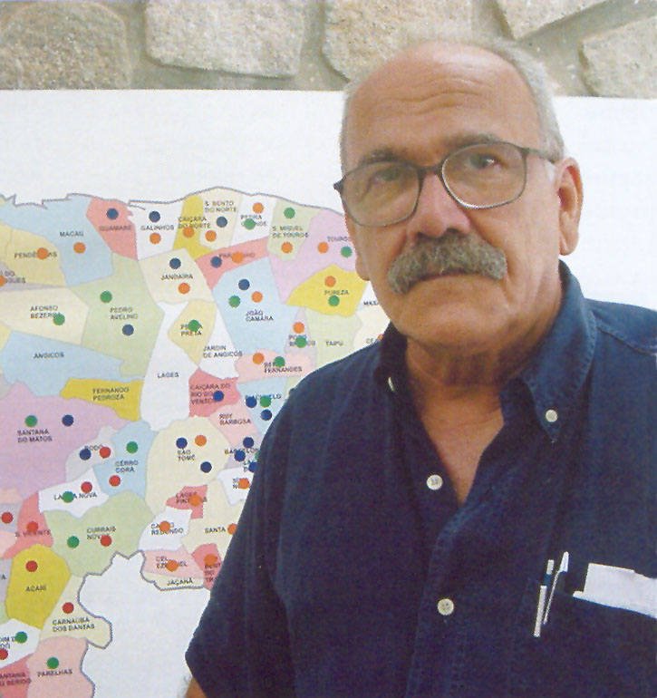 Imagem do prof. Dr. Arnon de Andrade, professor da UFRN e fundador da TV Universitária.